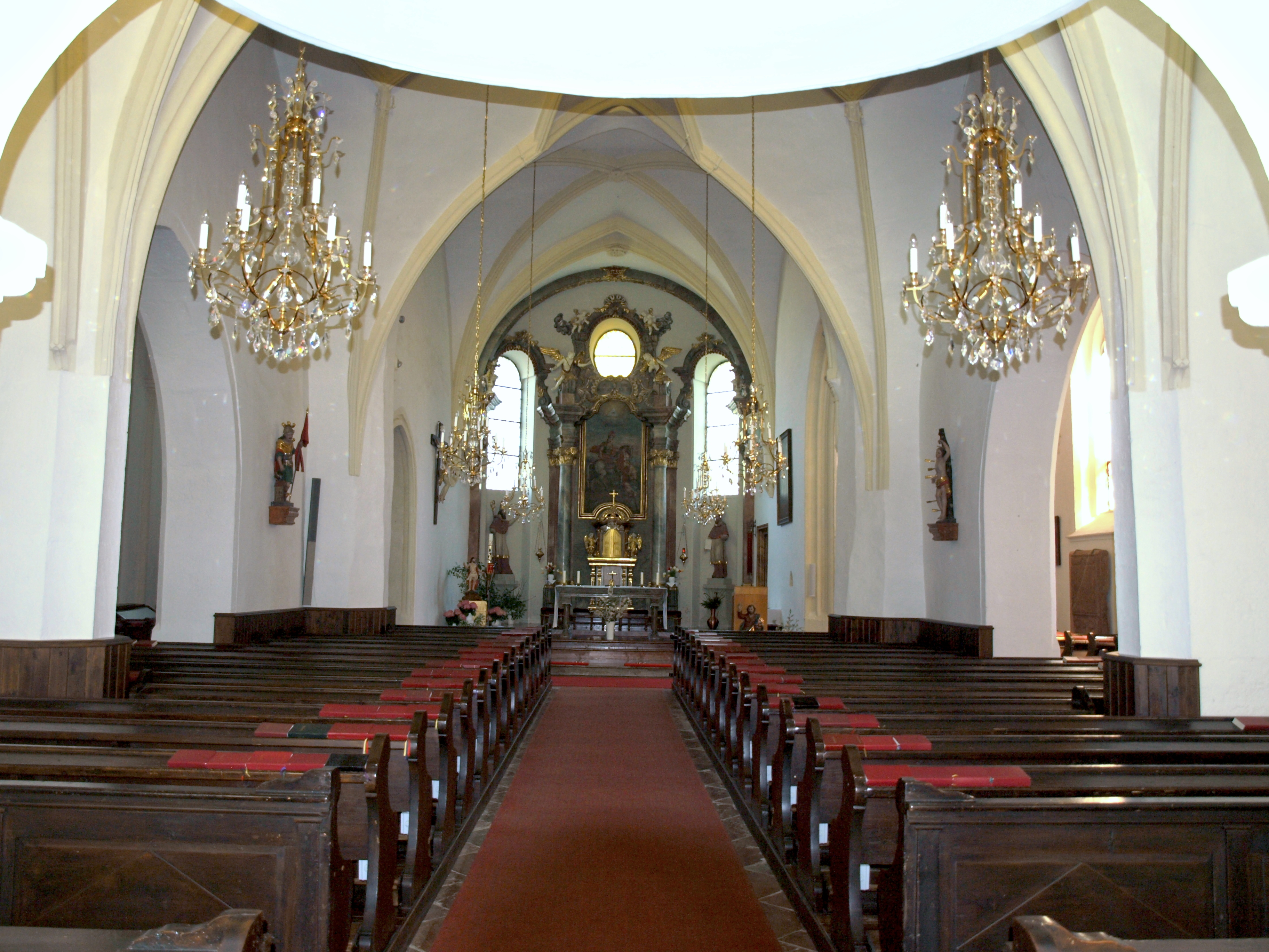 katholische Pfarrkirche heiliger Martin